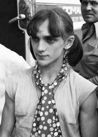 Gimnasta Emilia Eberle